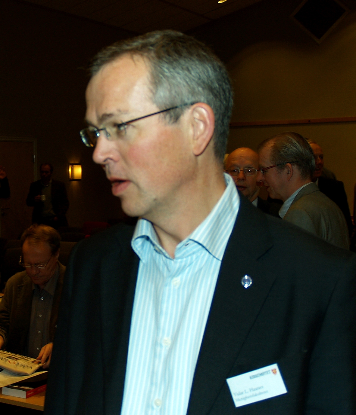 Vidar Haanes på kirkemøtet i 2008